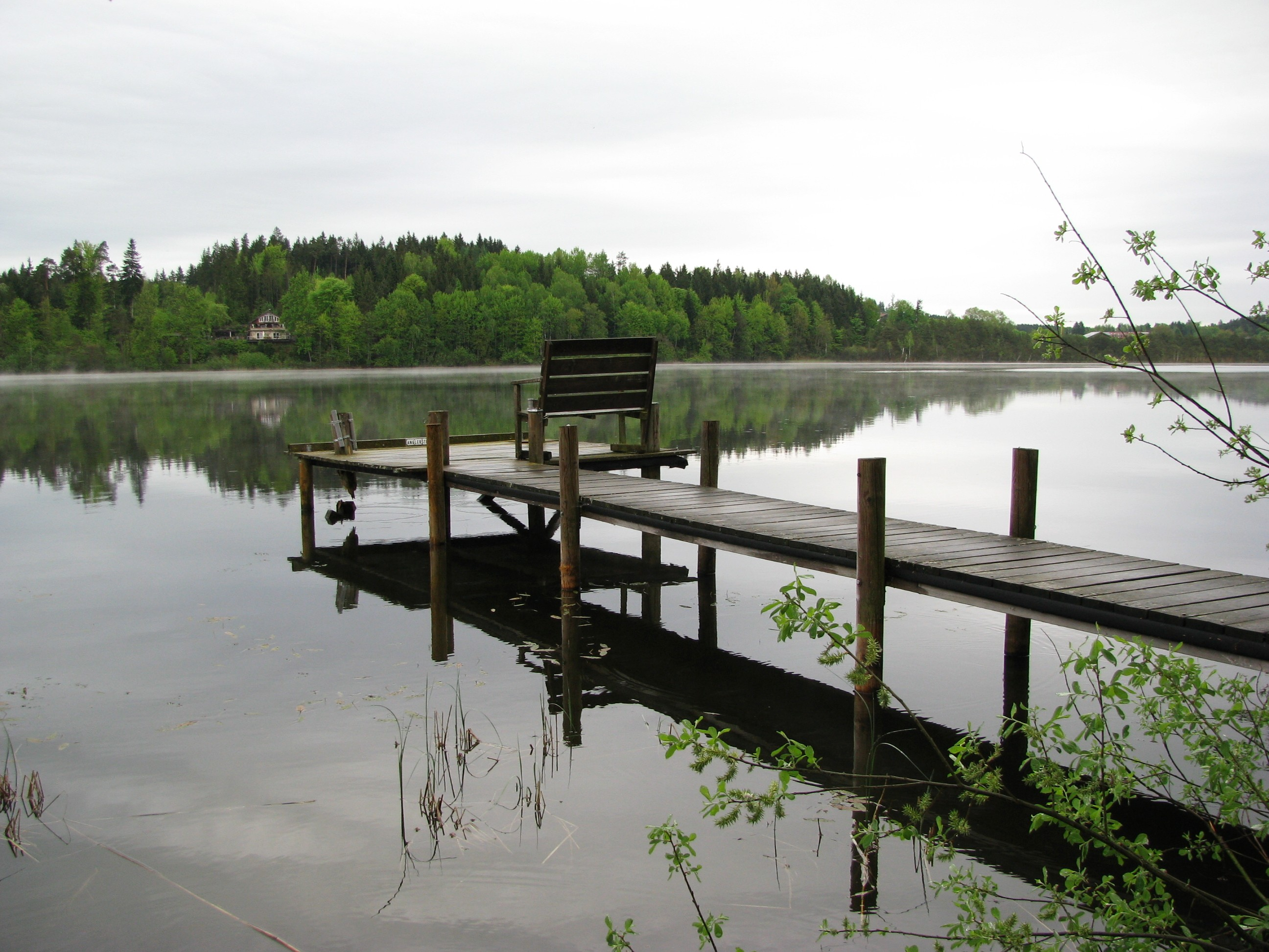 Hofstätter See; Steg bei Forst a.See